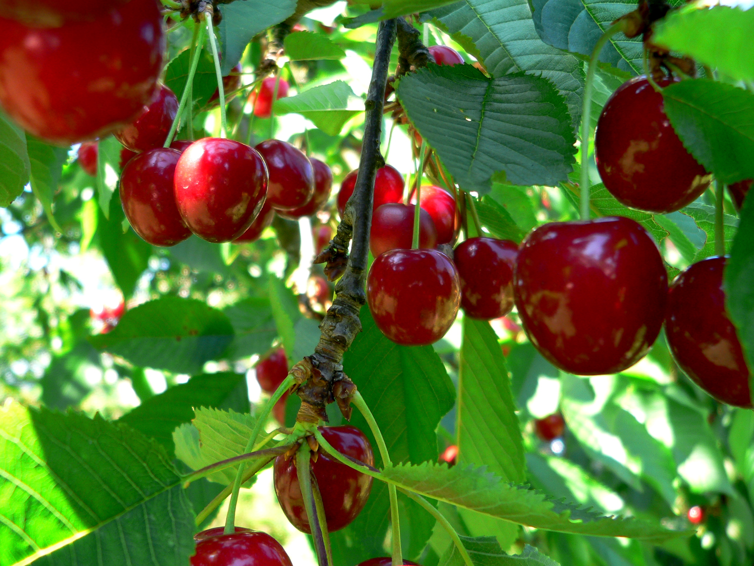 Reife Süßkirschen